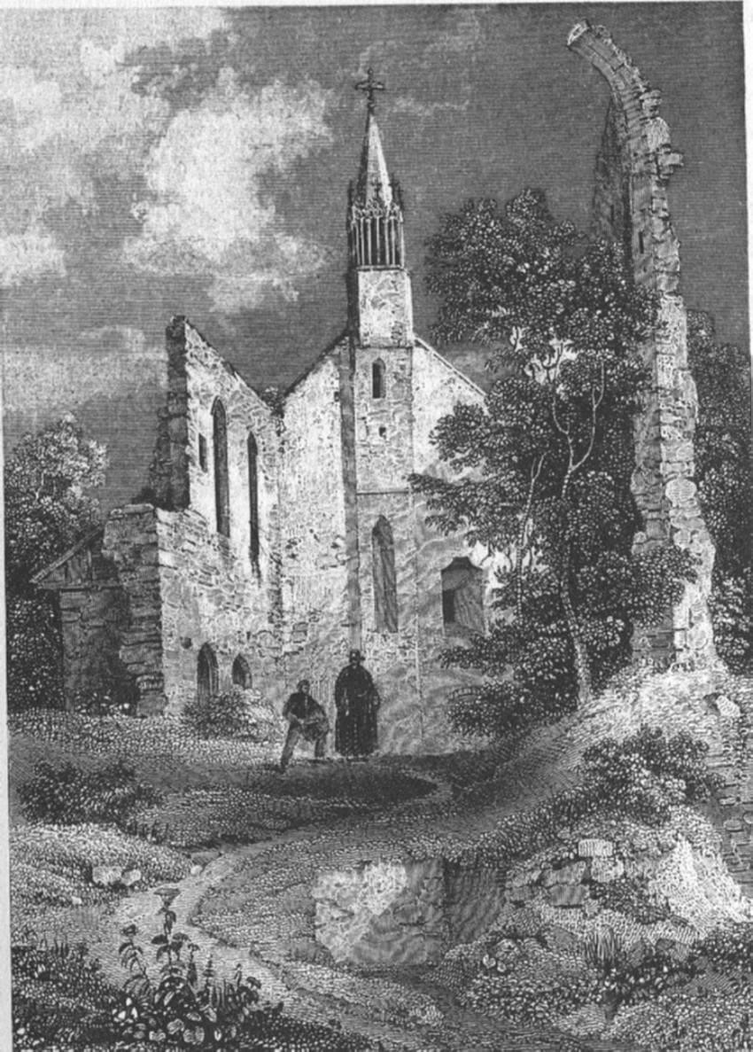 Kloster Rosenthal, Gezeichnet von Verhas, in Stahl gestochen von C. Frommel und H. Winkles